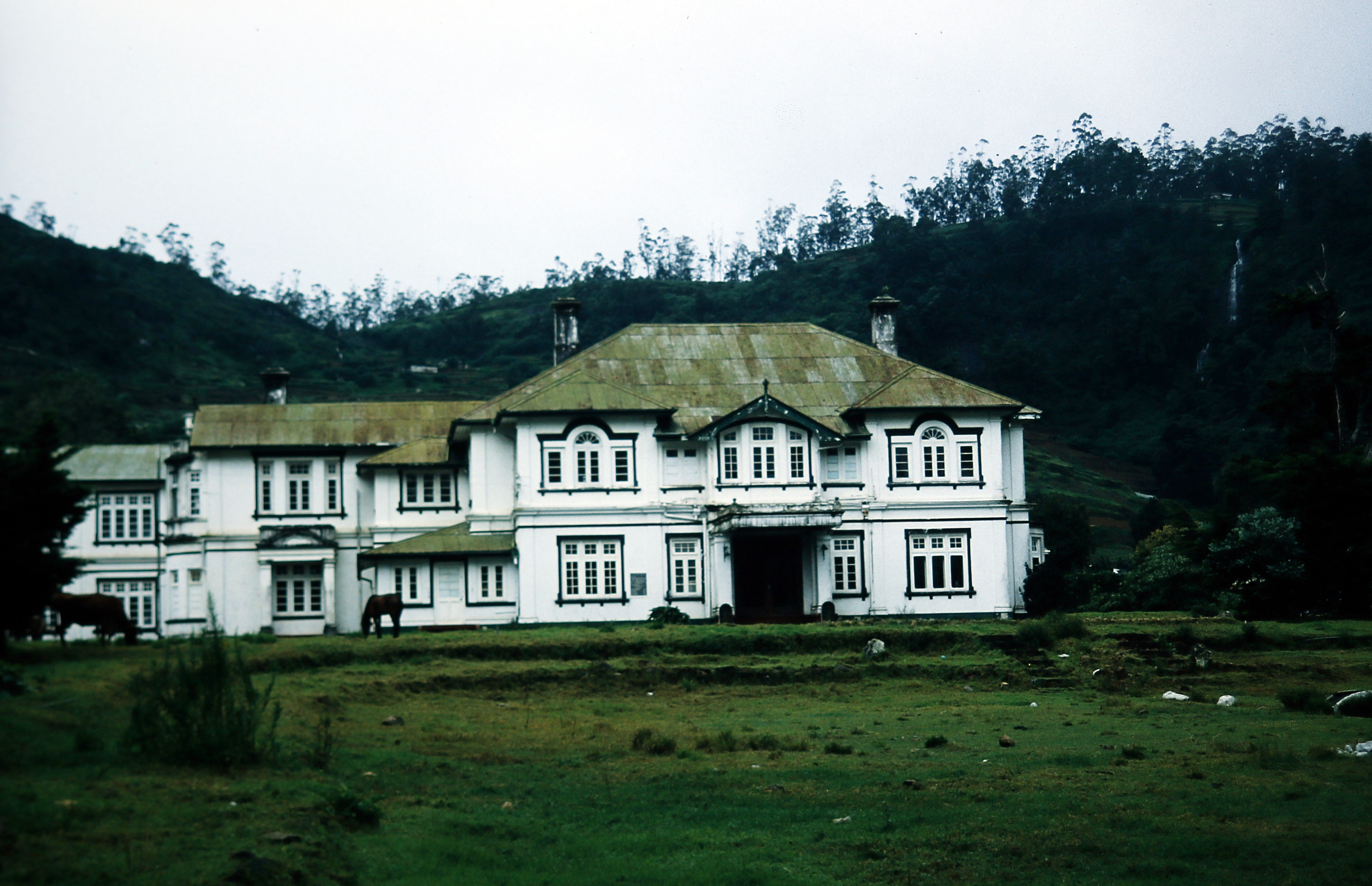 Typisches Haus aus der britischen Kolonialzeit